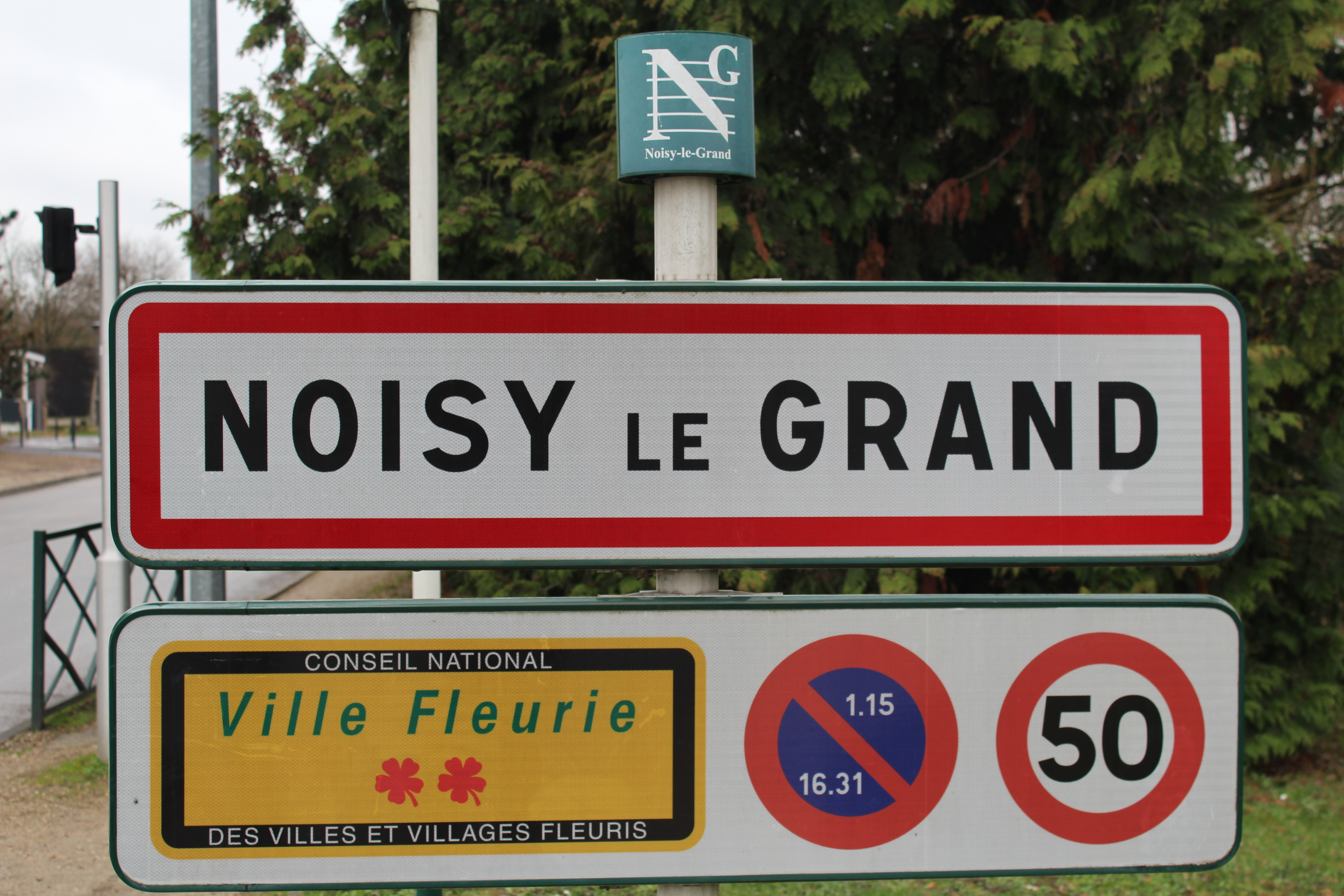 Panneau d'entrée dans Noisy-le-Grand depuis la rue Jules Ferry.